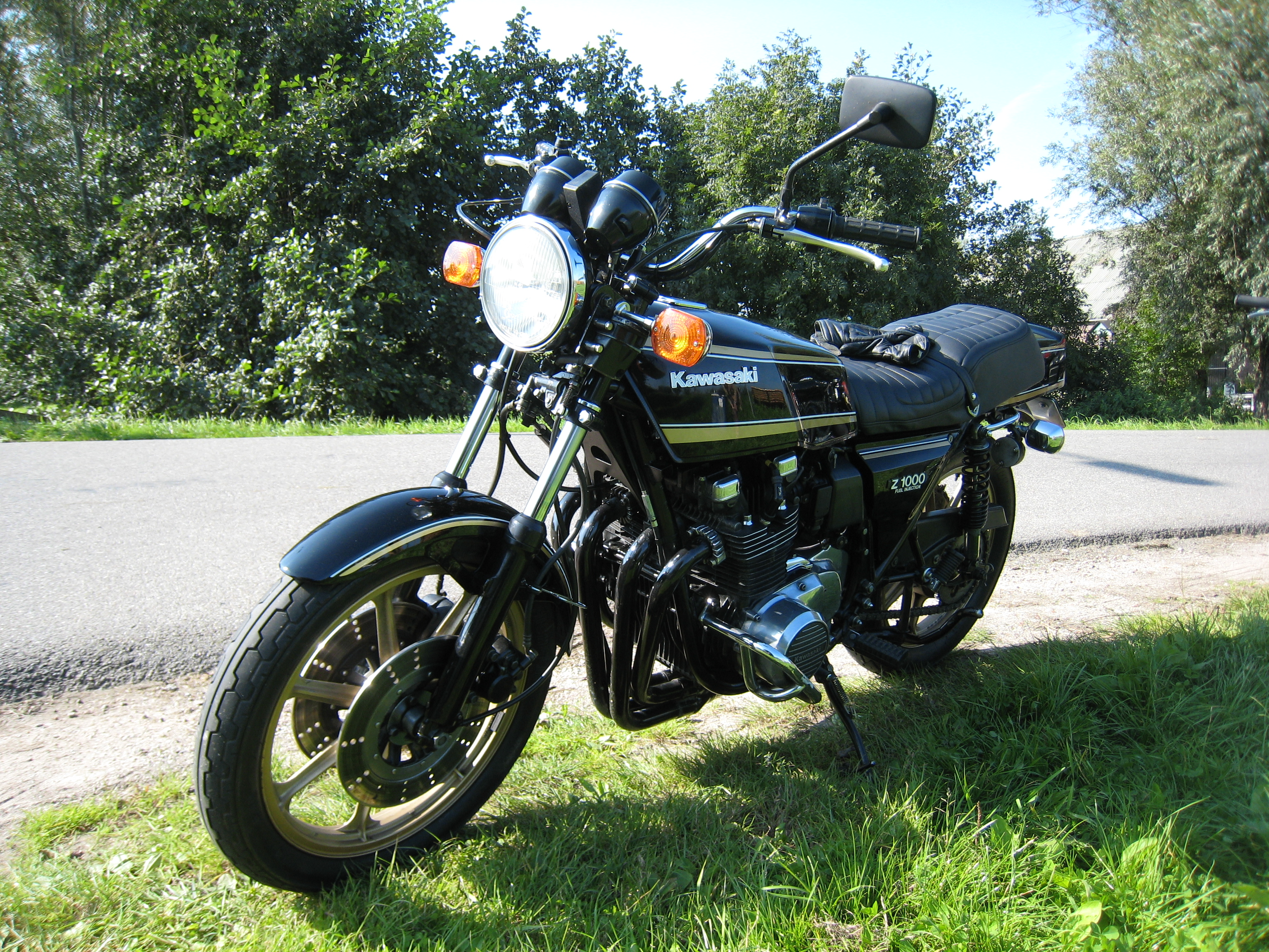 1980 Kawasaki Z-1000 H1